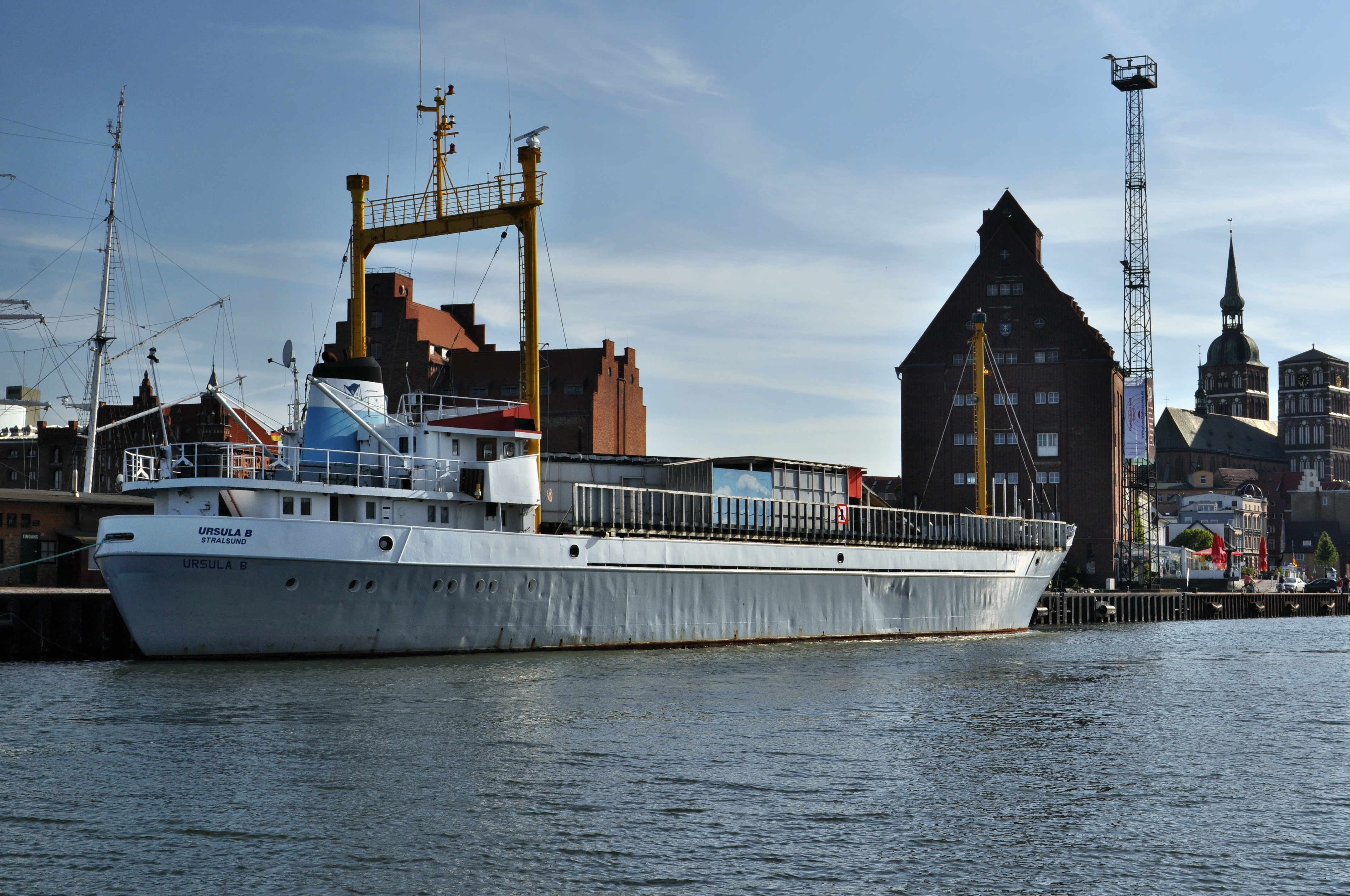 Stralsund. Ehemaliger Frachter "Ursula B." als Theaterschiff im Stralsunder Hafen.